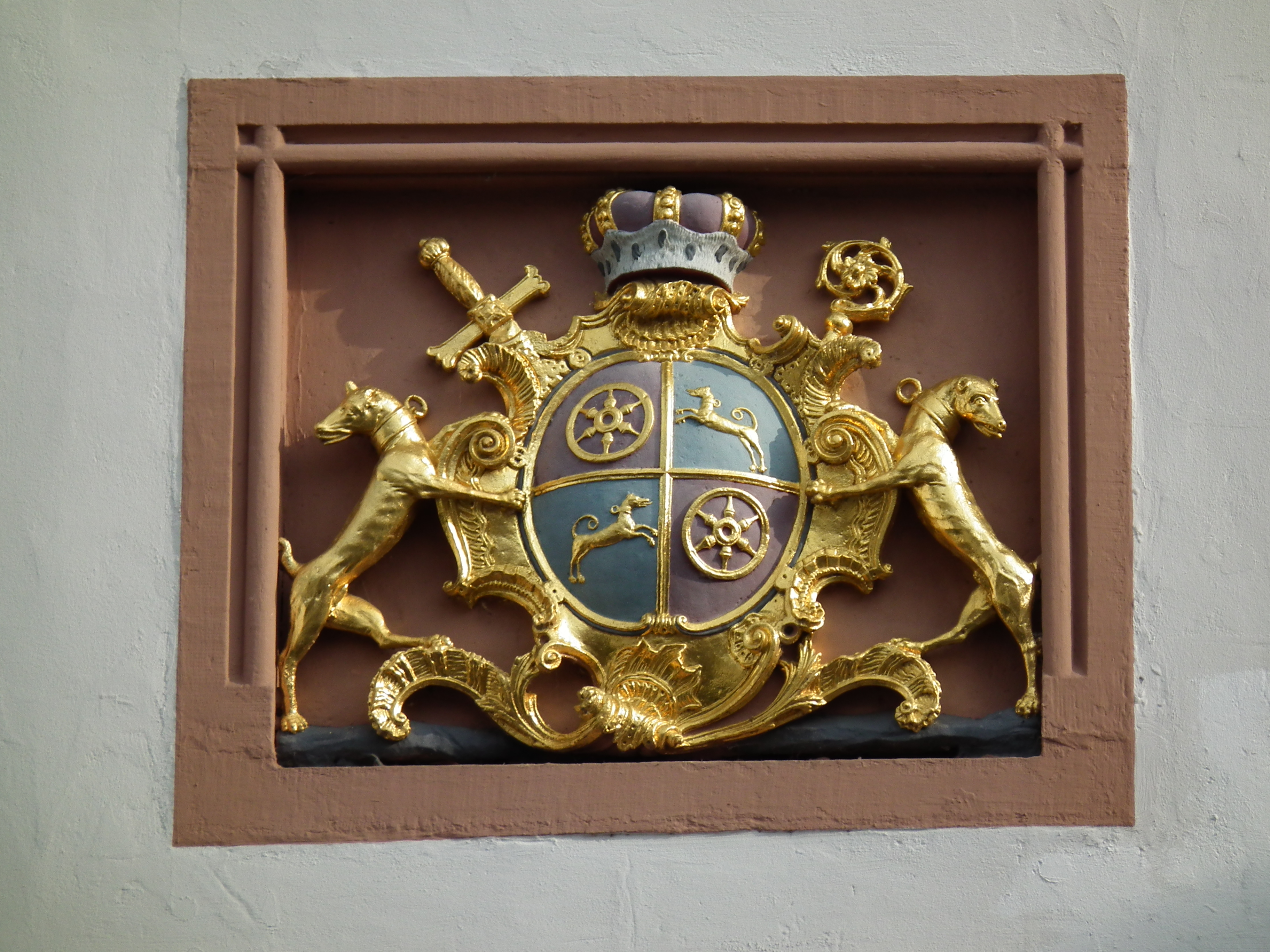 Wappen des Erzbischofs Kurfürst Johann Friedrich Karl Graf von Ostein am Turm des Landratsamts in Heppenheim (Kreis Bergstraße, Hessen, Deutschland)